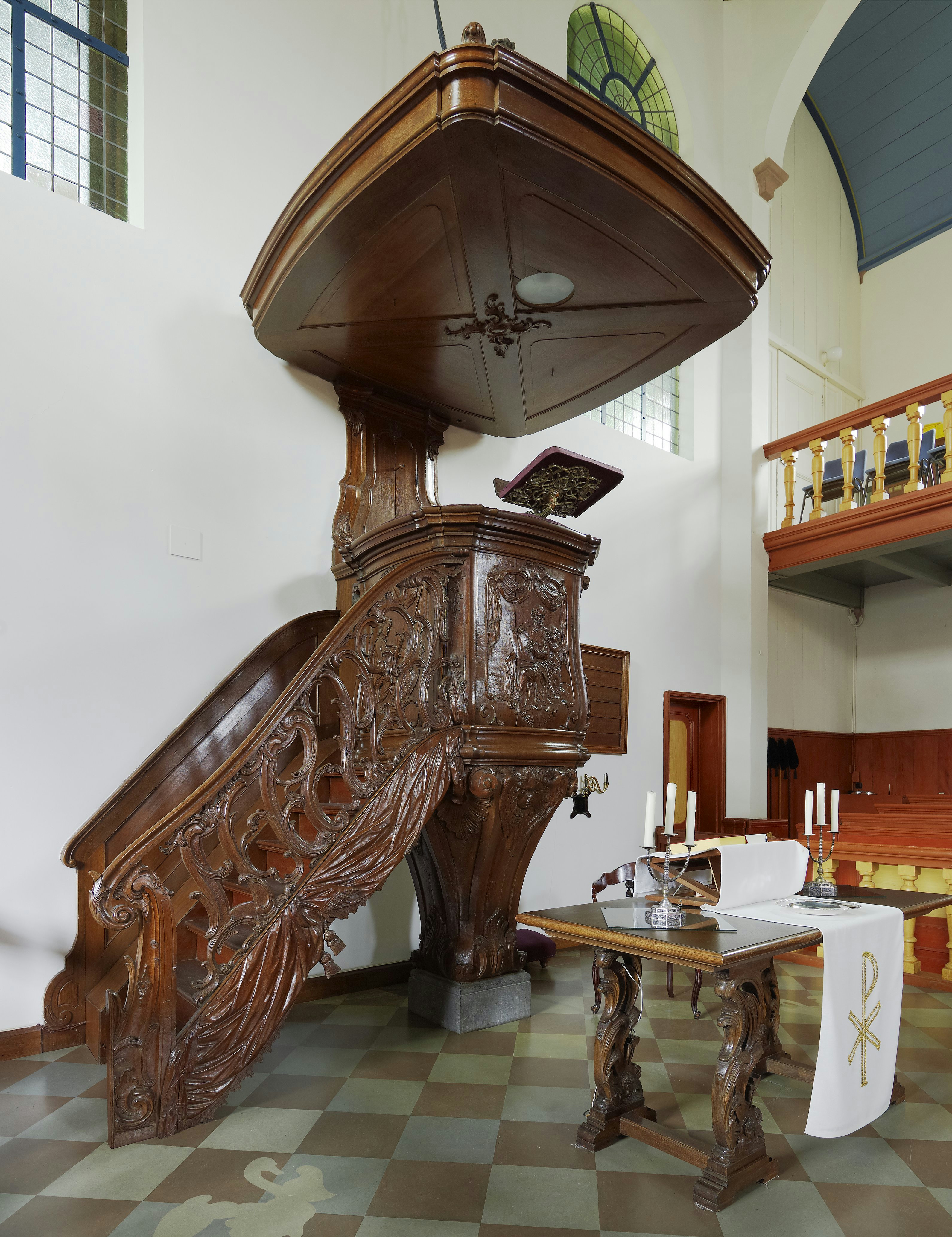 Evangelische Lutherse Kerk: Interieur, preekstoel